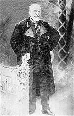 Carol I. , Foto von 1881